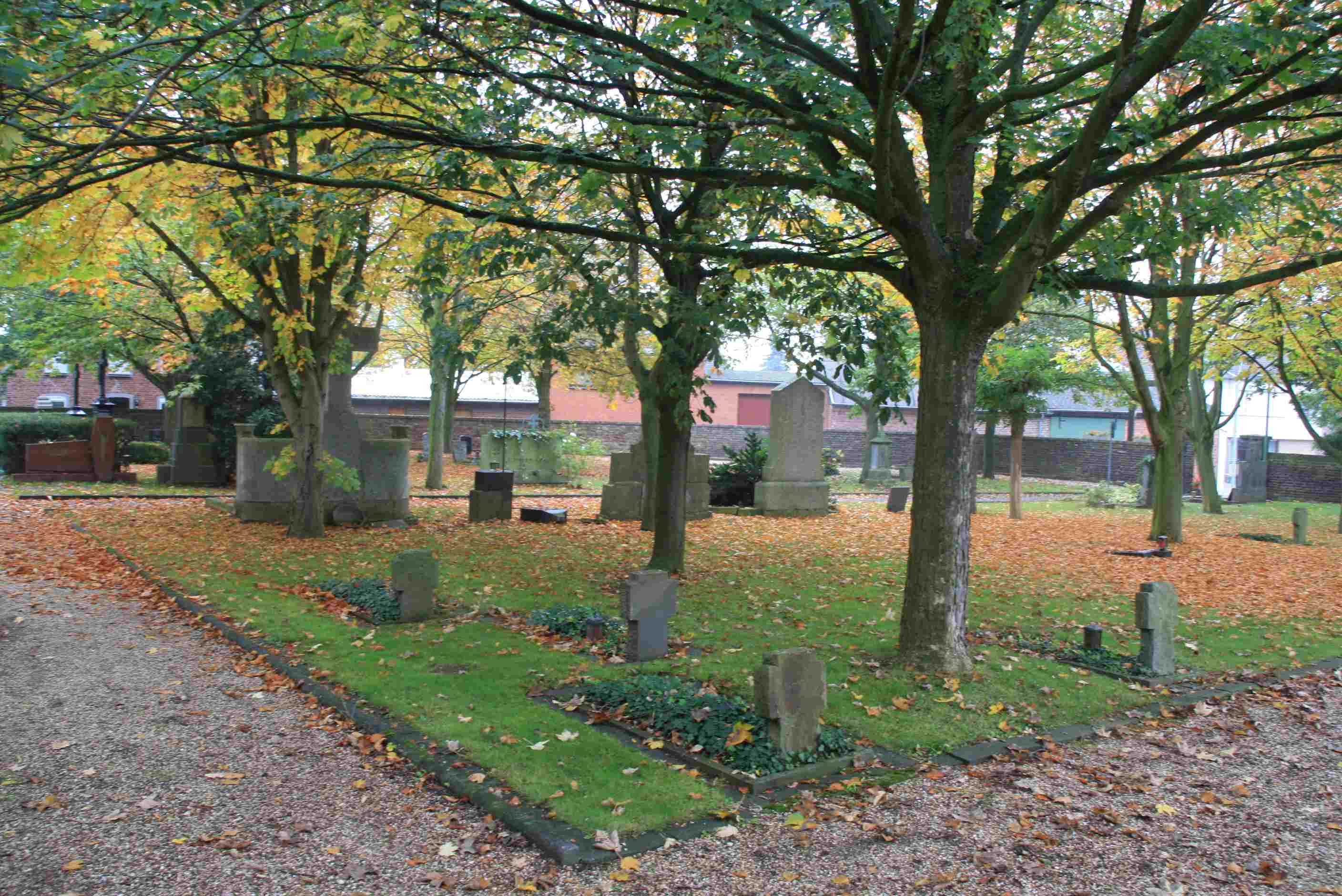 Kirchhof Richtung Kirchstraße